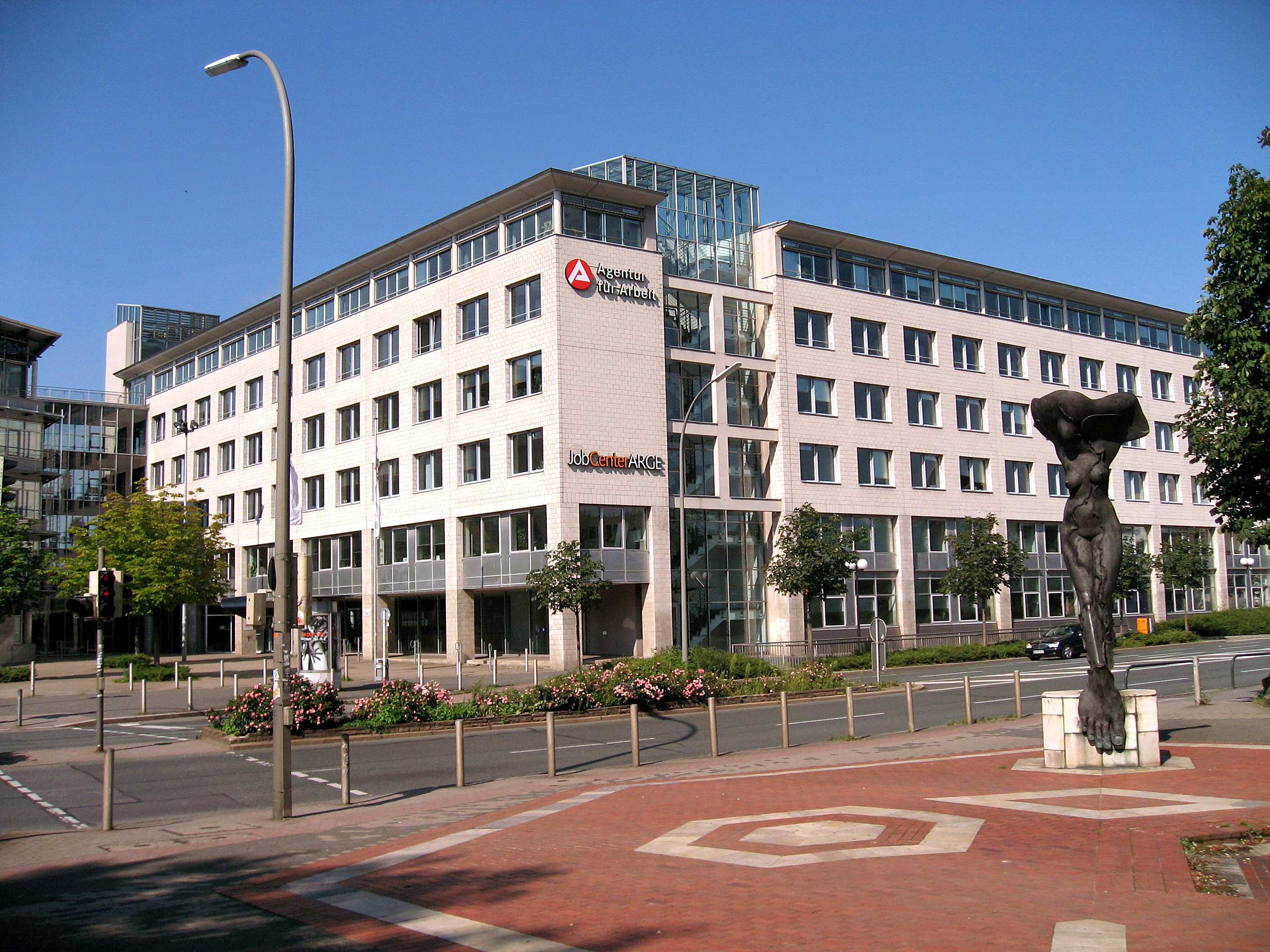 Dortmund, Nordstadt, Arbeitsverwaltung Steinstraße